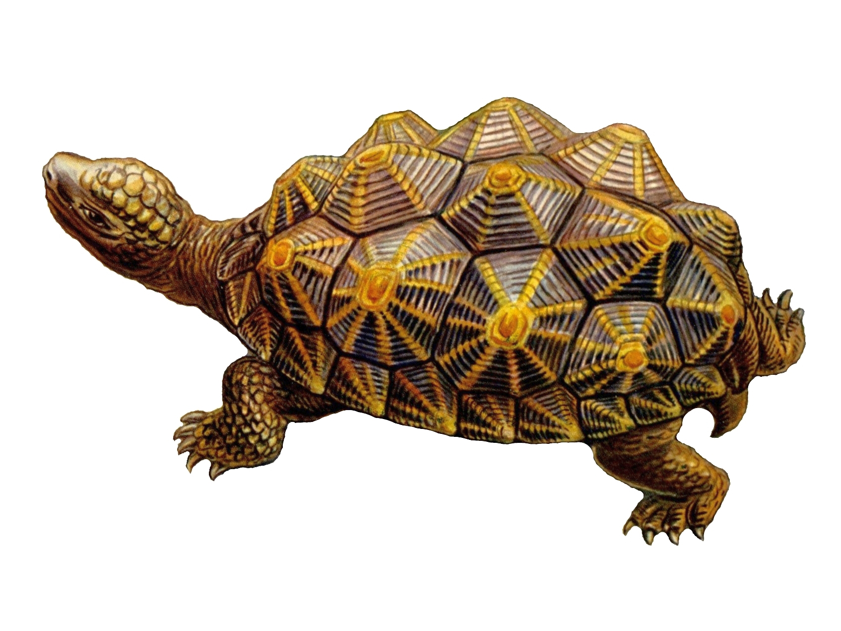 Testudo geometrica (Linné) = Psammobates geometricus (Linnaeus, 1758)